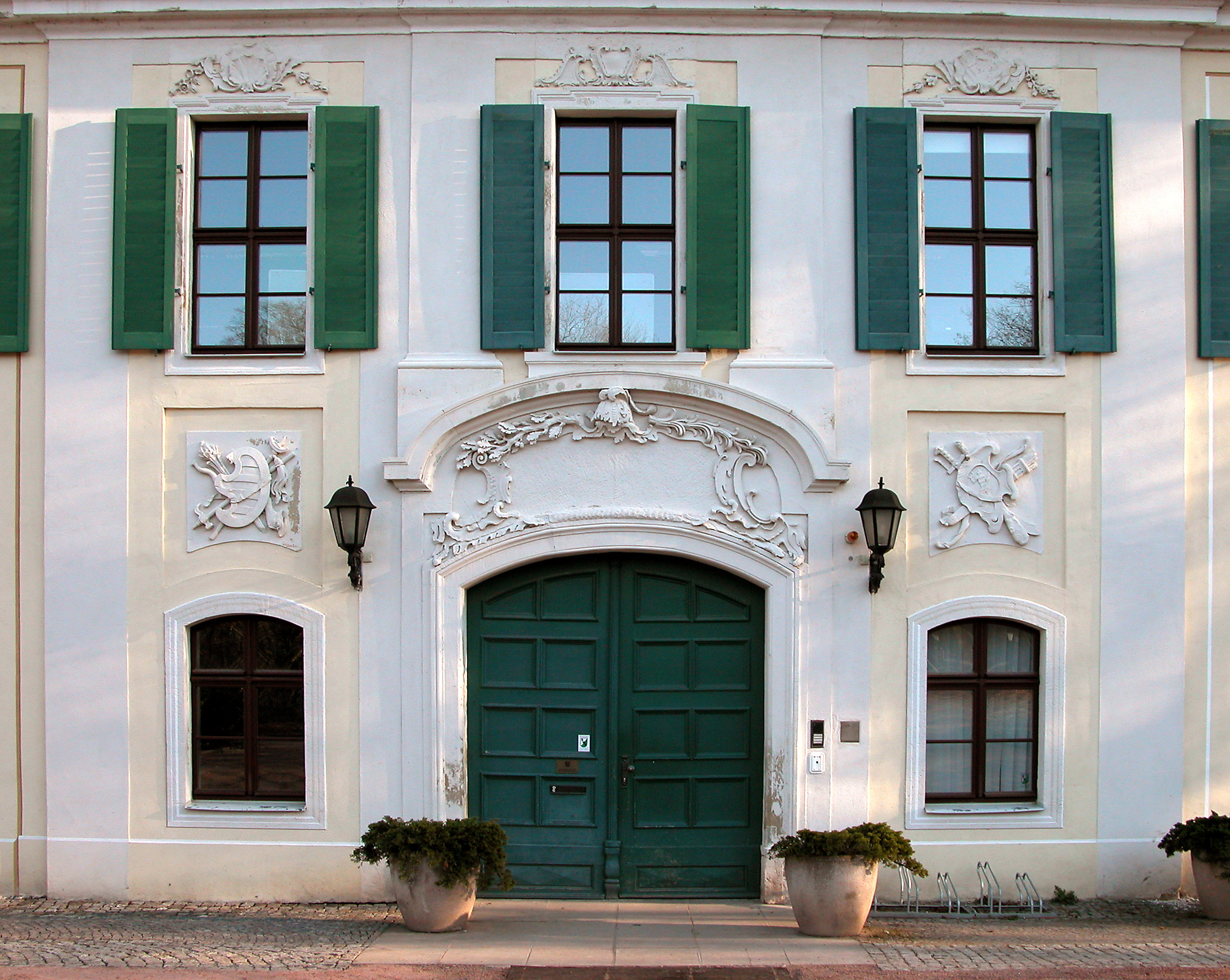 Schloss Siebeneichen, Hauptportal in der barocken Westfassade, Zustand Jan. 2005.